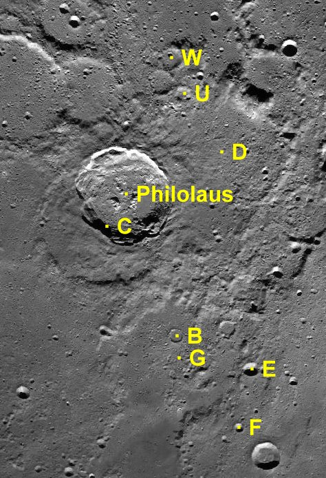 Cráter lunar Philolaus. Cráteres satélite. (Imagen LRO)